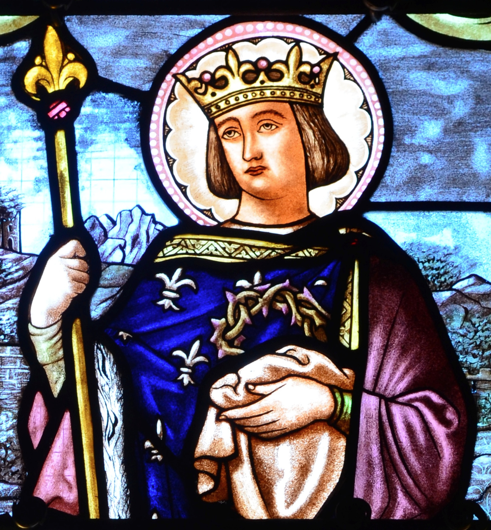 Vitrail représentant Saint Louis à l’église d'Izernore